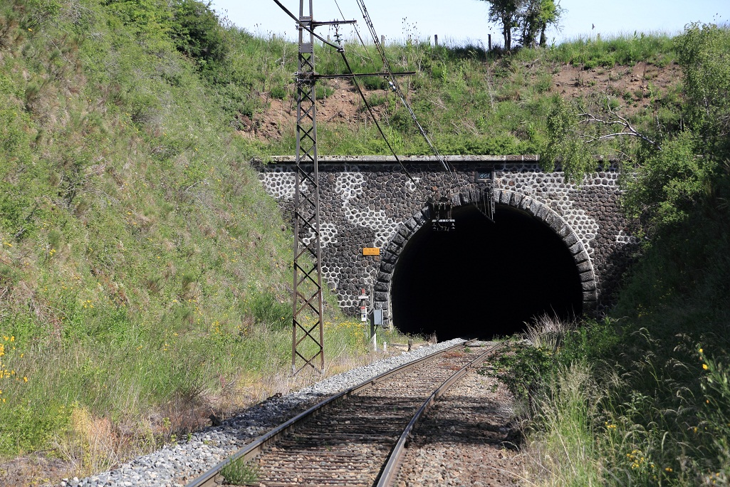 Tête sud du tunnel du col de Mallet en juin 2011, Cantal, France.